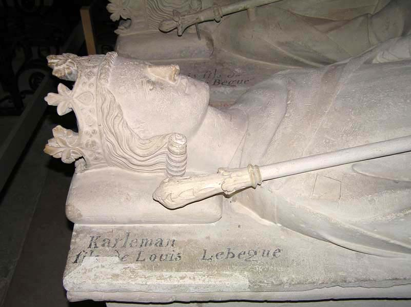 Gisant de Carloman II roi des Francs